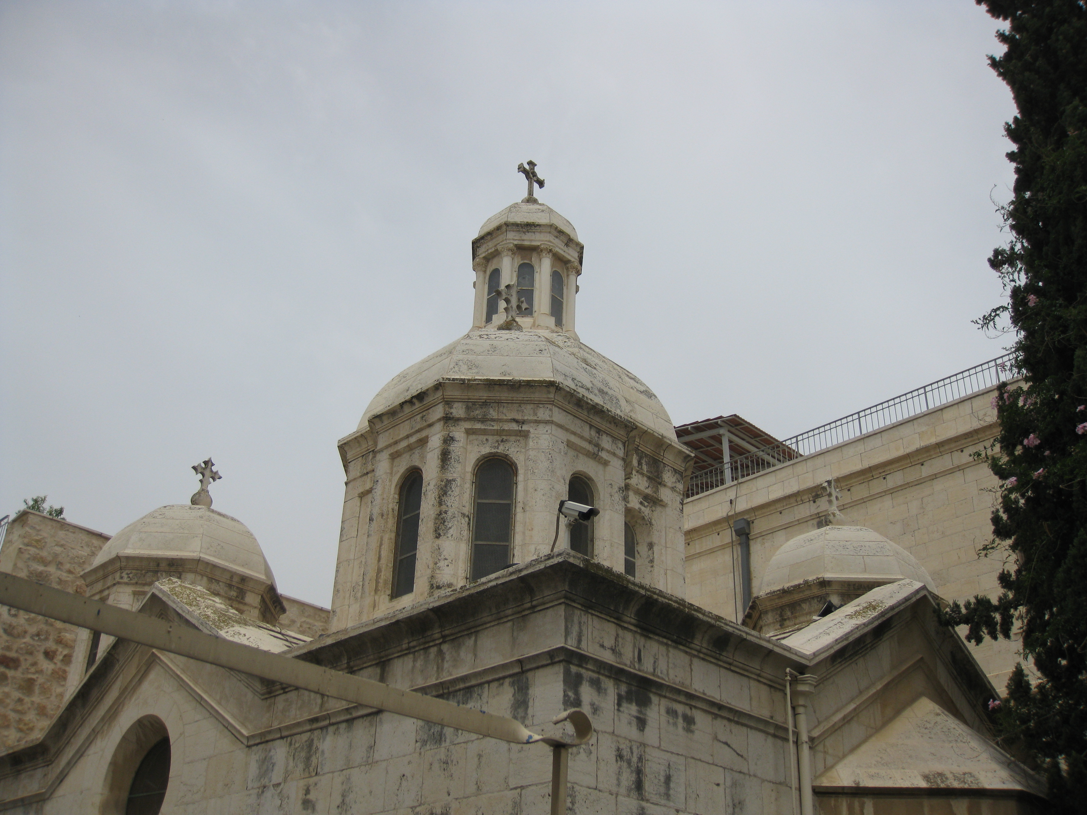 Muslim Quarter - Church of the Condemnation הרובע המוסלמי בירושלים - כנסיית ההלקאה - התחנה השנייה של הויה דולורוזה